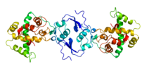 estructura de la osteonectina